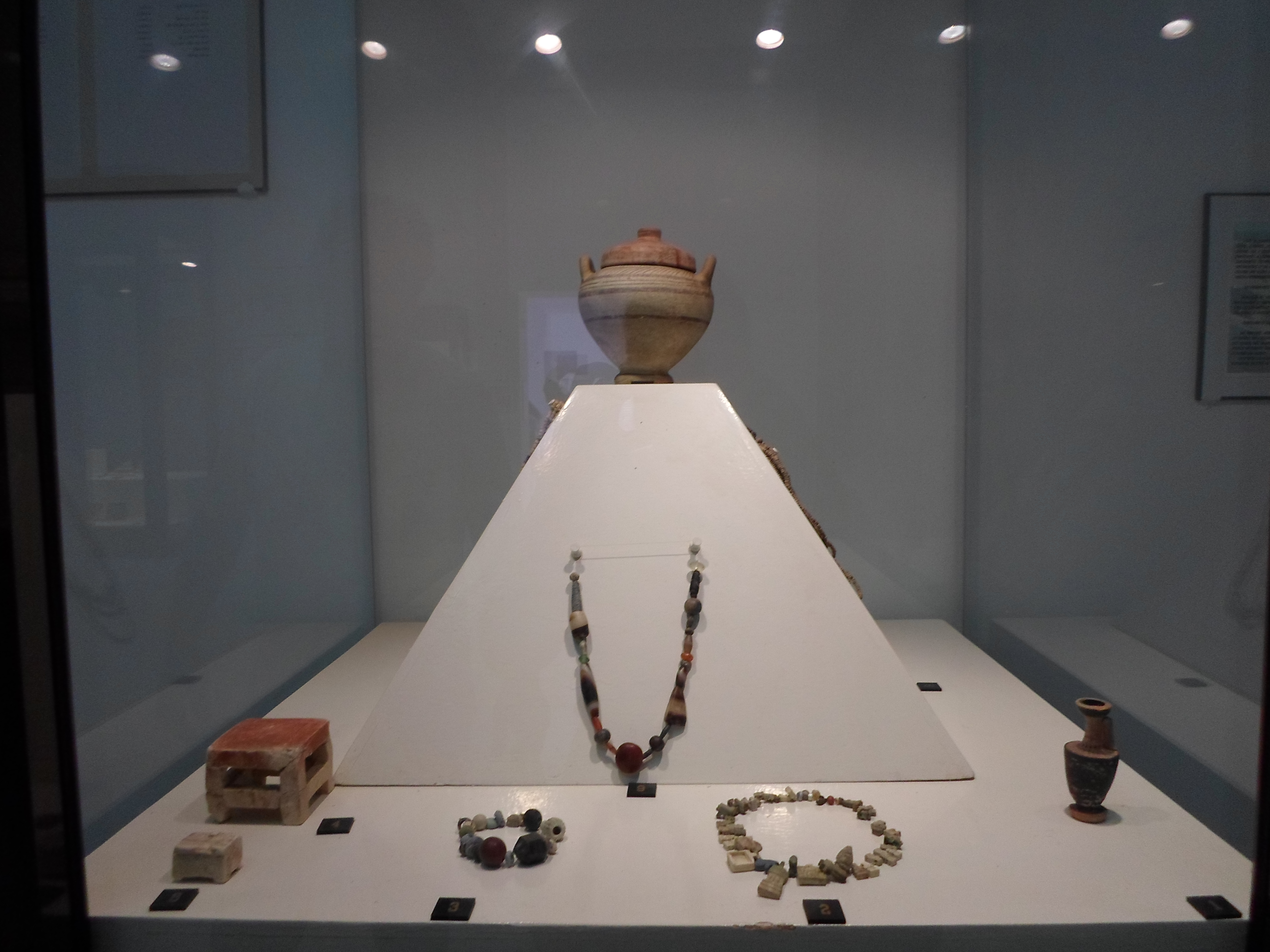 Bijoux au Musee National de Kerkouene